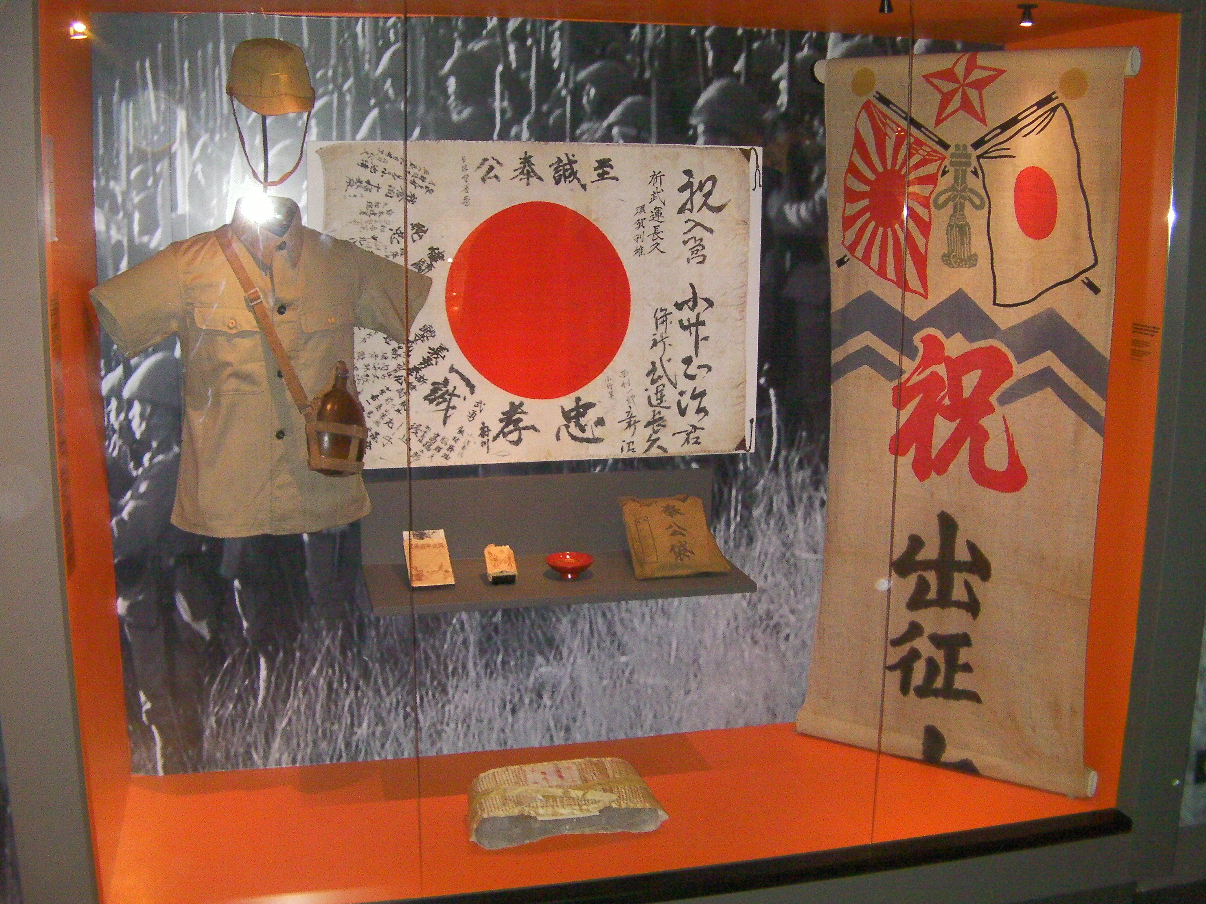 Dafar soudard lu impalaeriel Japan e-pad an Eil Brezel-bed.